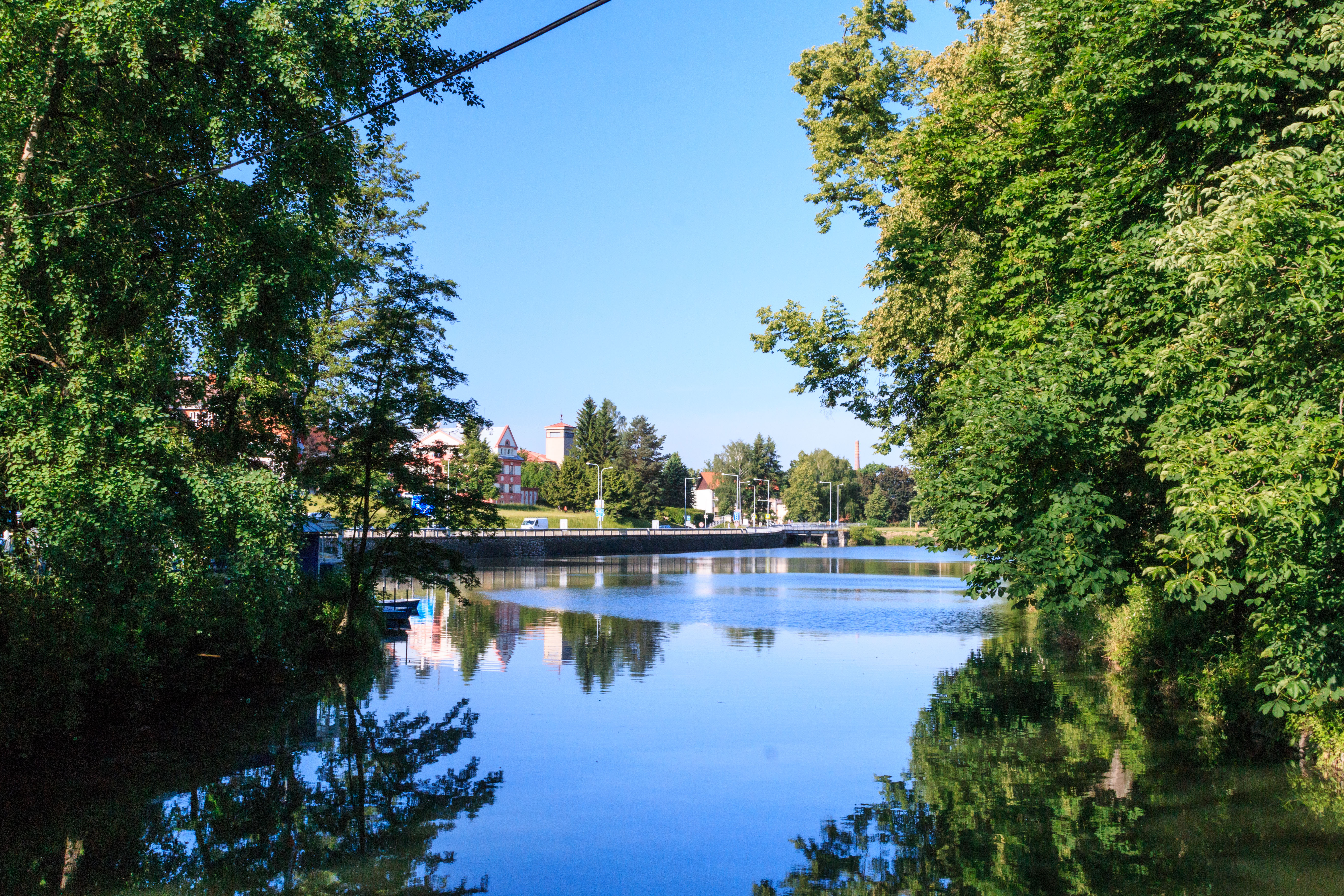 Synský rybník v Poličce Project: Vodstvo.